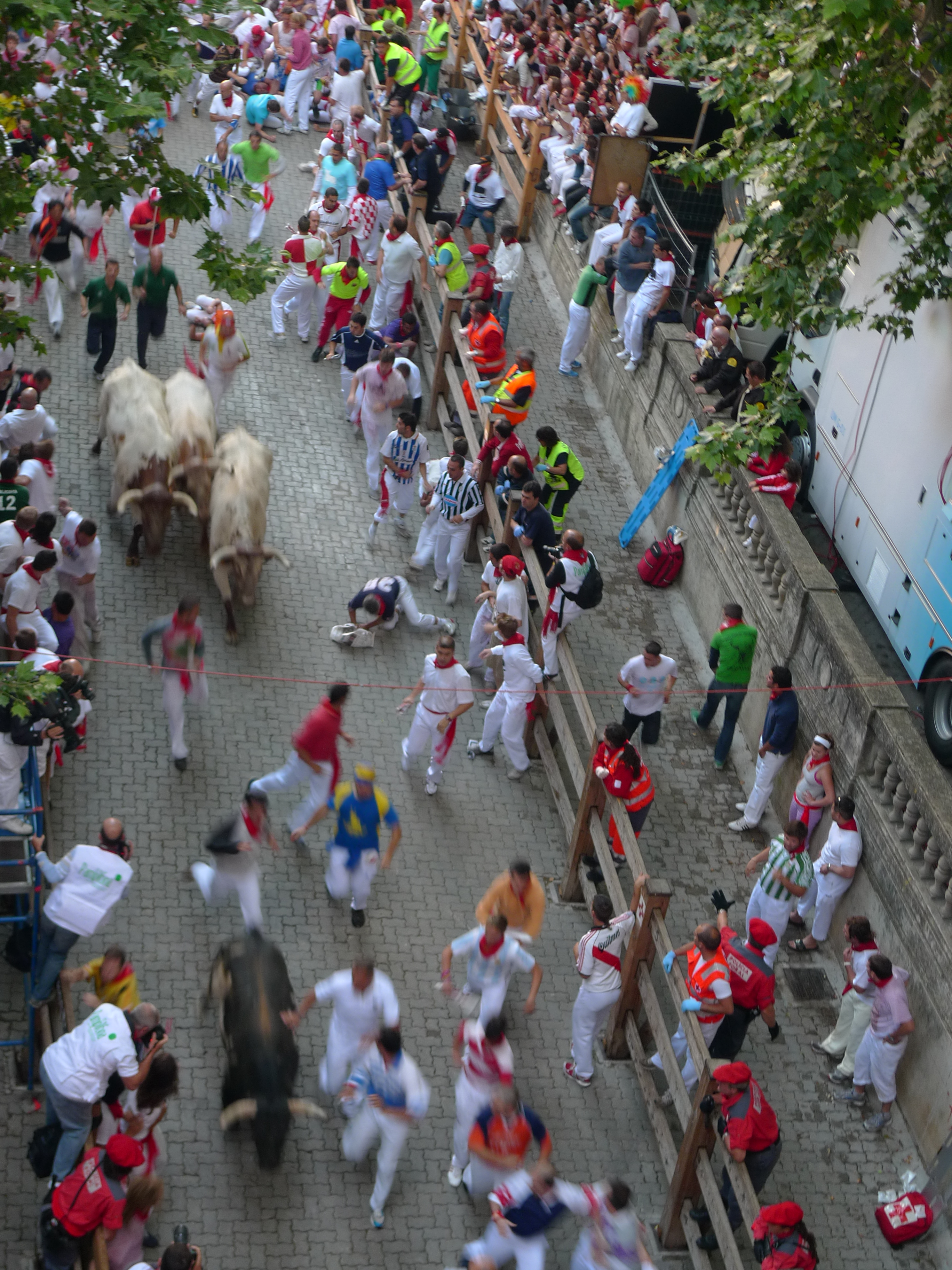 sanfermin 2009, pamplona, spain